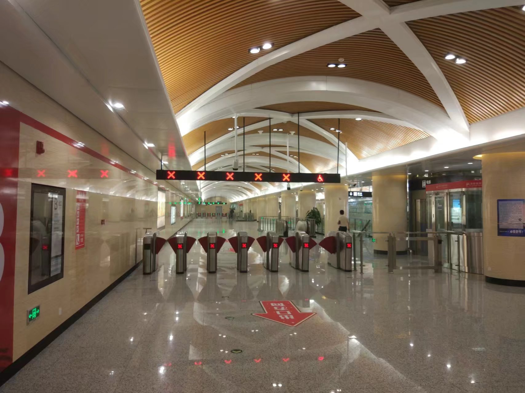 长春地铁自由大路站站厅